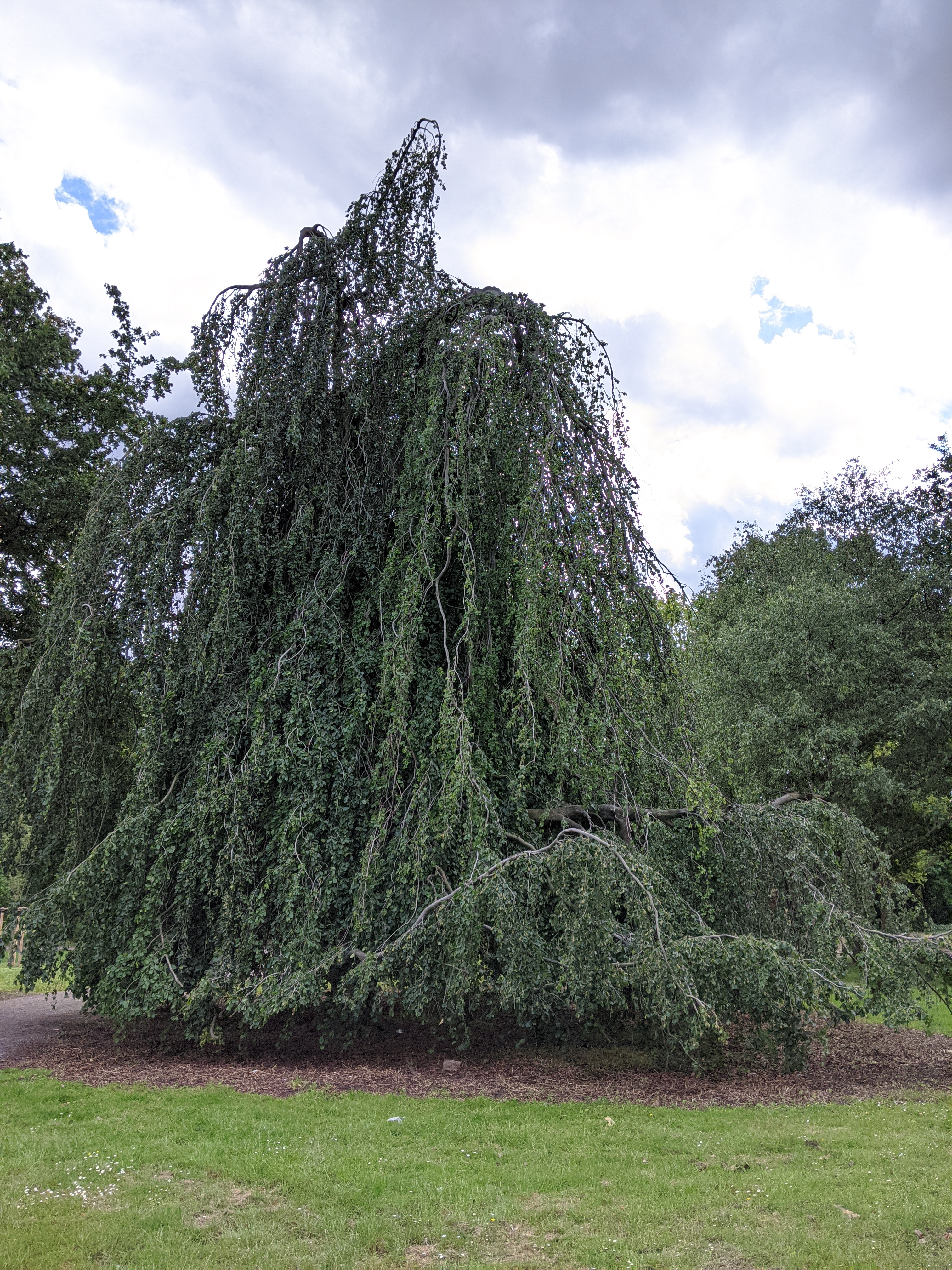 Trauerbuche am Gasthaus im Volkspark Mengede (Dortmund)